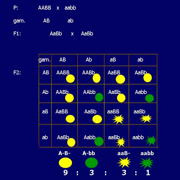 аутор Снежана Трифуновић